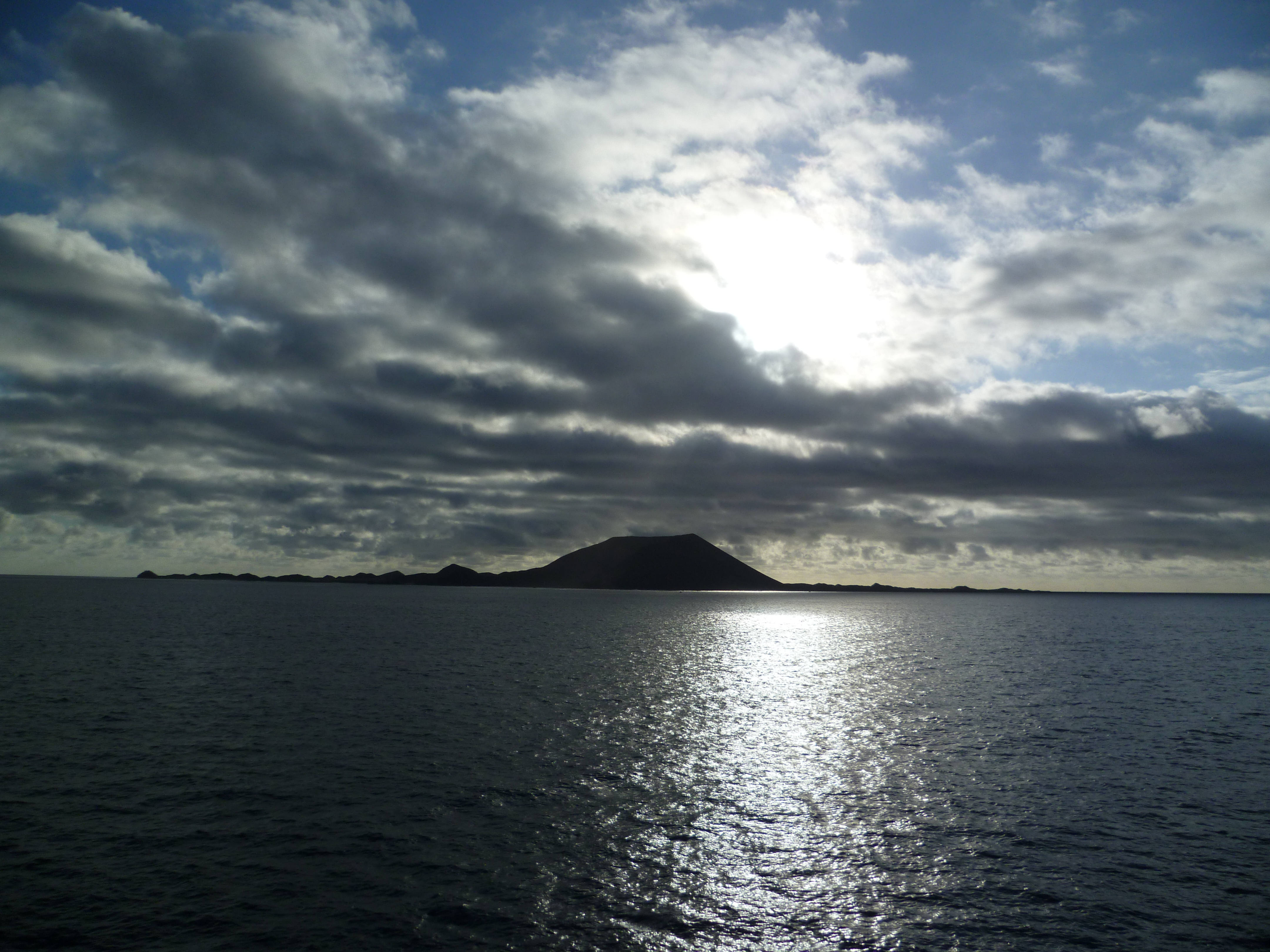 Fotografía de la Isla de Lobos.